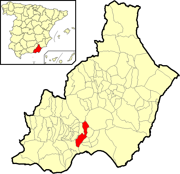 Situación del término municipal de Gádor respecto a la provincia de Almería, en España.